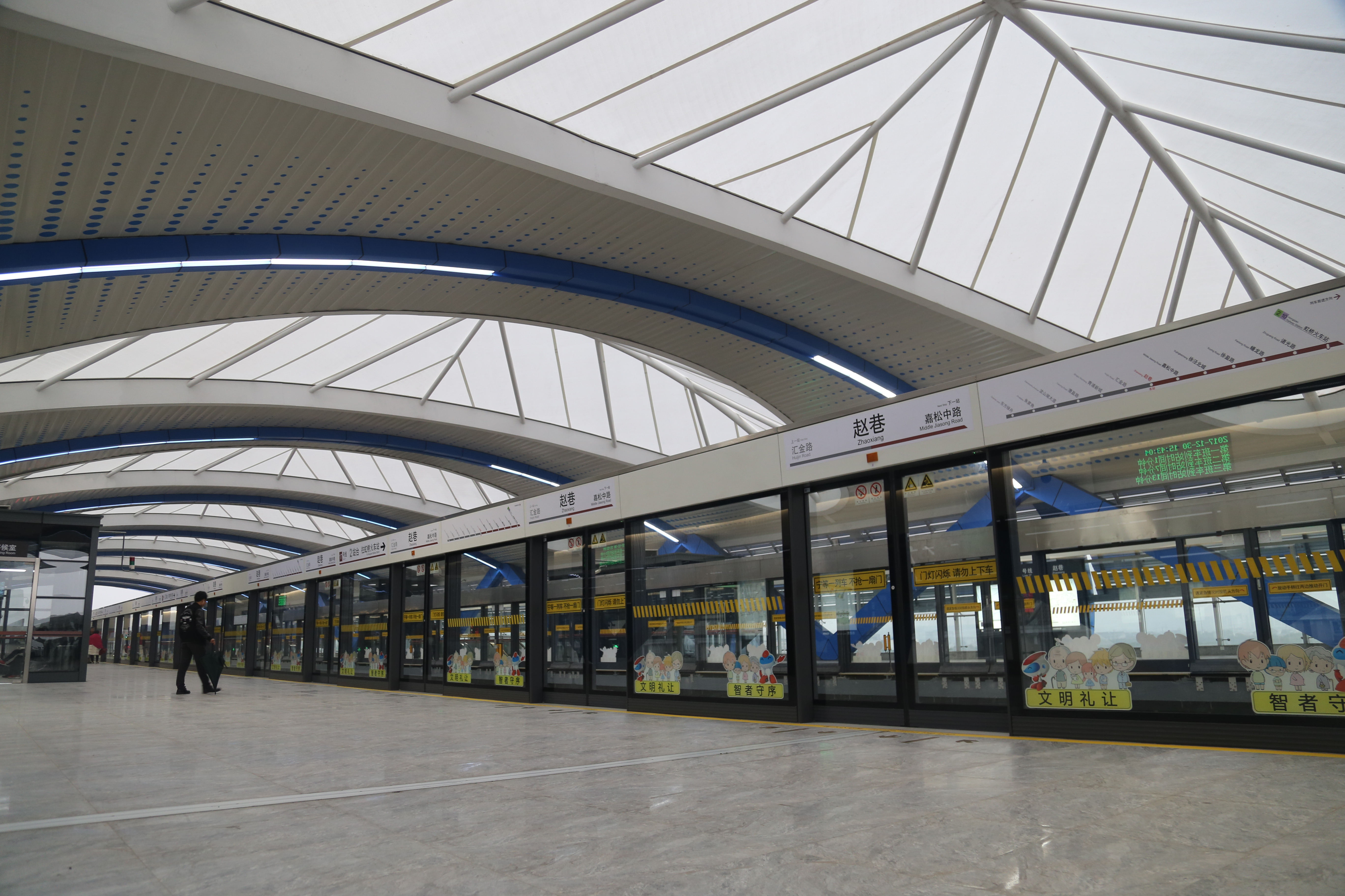 上海地铁17号线赵巷站站台